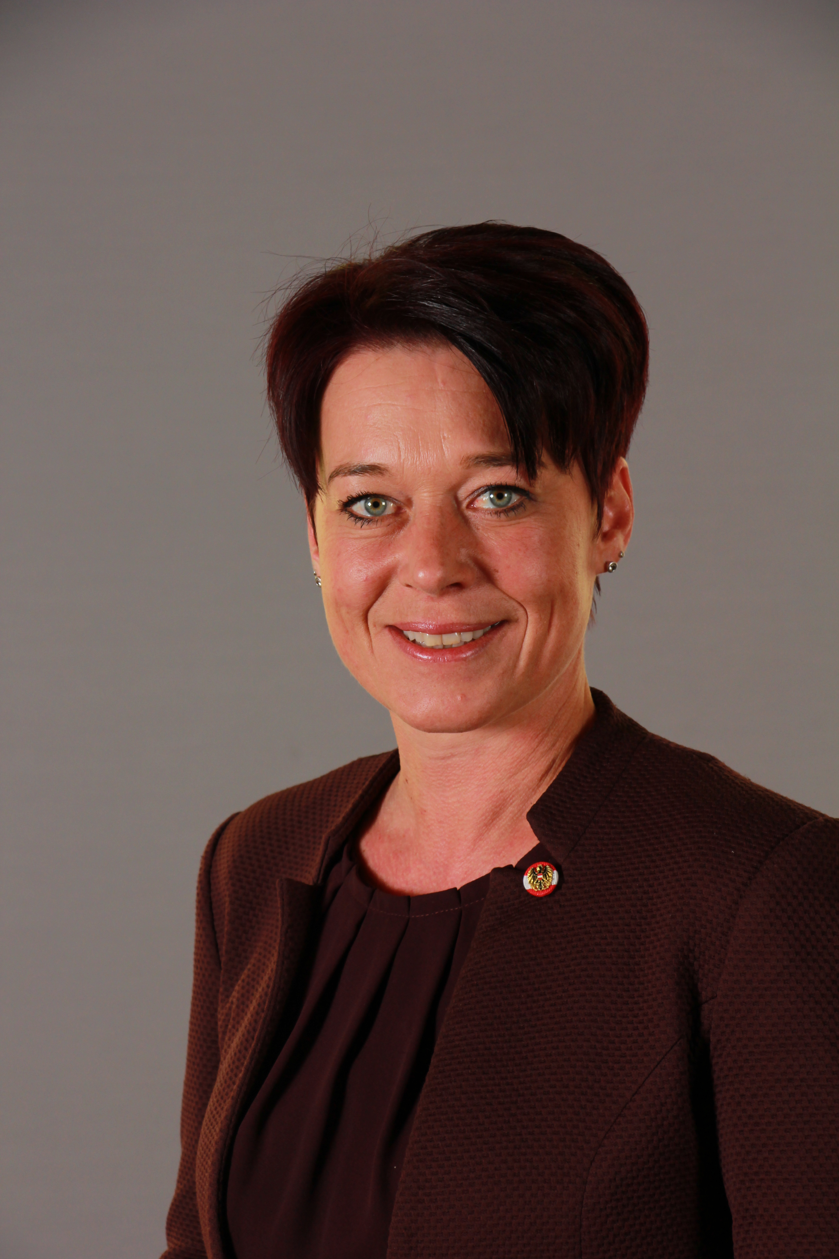 Sonja Ledl-Rossmann, Abgeordnete zum österreichischen Bundesrat